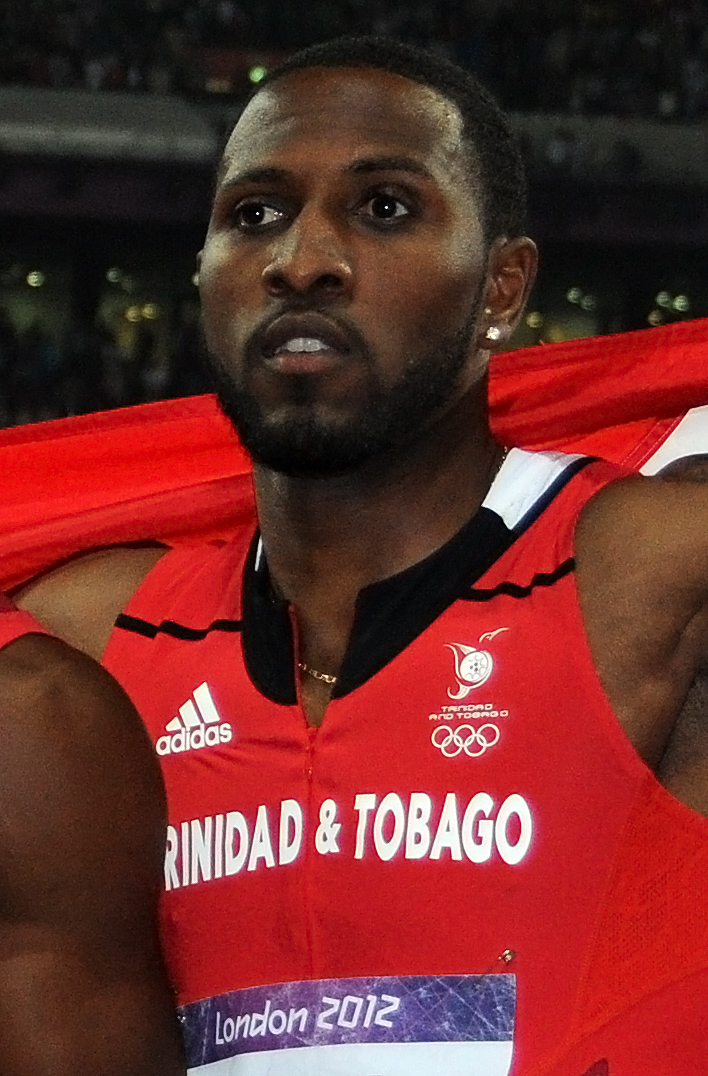 Portrait de Richard Thompson sprinteur de Trinitad-Tobago qui a obtenu une médaille de bronze avec son équipe aux 4x100 aux JO de Londres 2012.